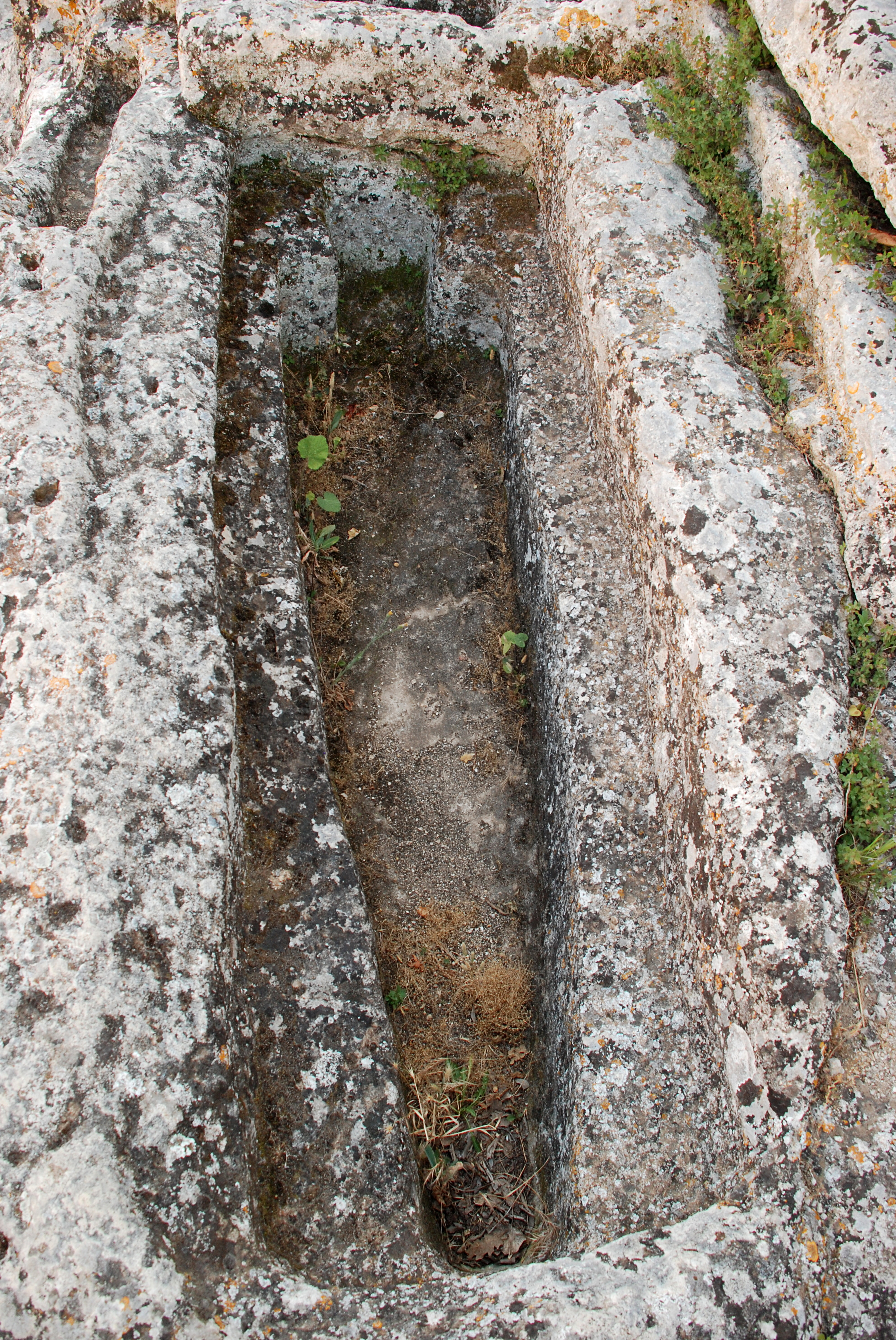 France - Provence - Vaucluse - Luberon - Église de Saint-Pantaléon